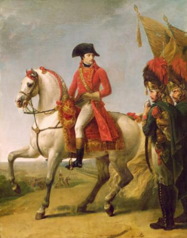 Bonaparte récompense les grenadiers de la garde consulaire après la bataille de Marengo en leur attribuant à chacun un Sabre d'honneur.